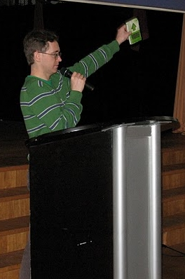 Peep Mardiste Erakonna Eestimaa Rohelised Tallinna piirkonna asutamiskoosolekul Tallinna Ülikooli peahoones